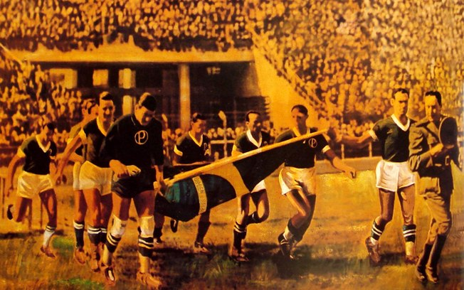 Tela que retrata o episódio "Arracada Heroica", quando a Sociedade Esportiva Palmeiras conquistou o Campeonato Paulista de 1942.